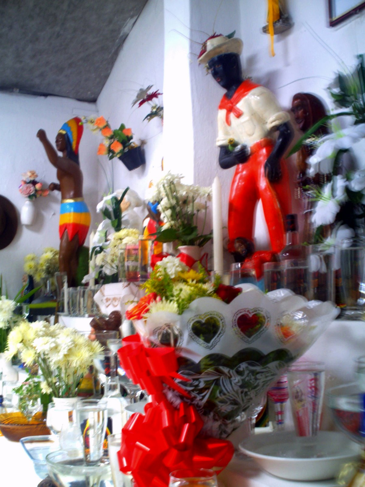 Peji com as imagens dos mestres e mestras da Jurema Sagrada